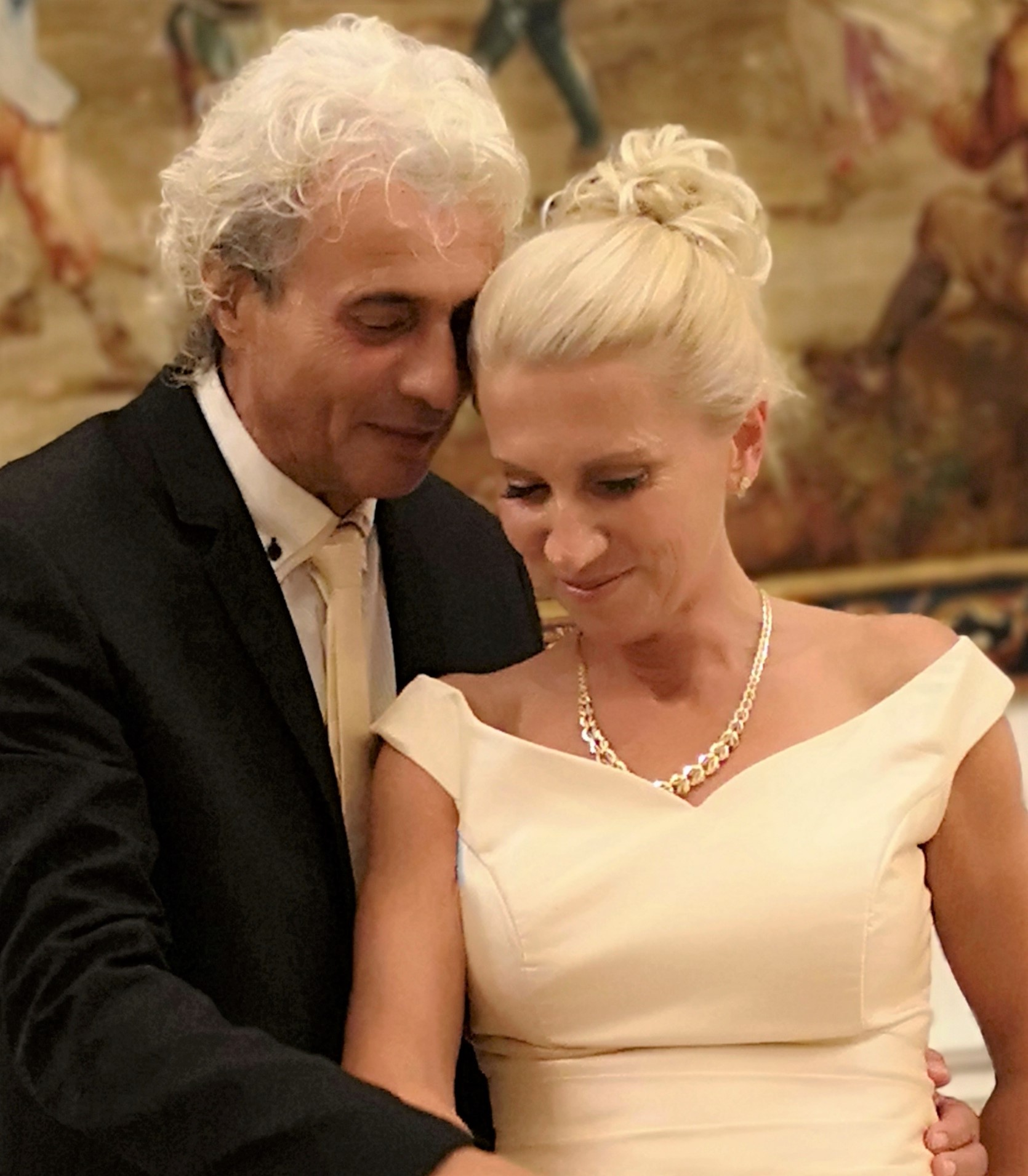 Somogyvári Andrea és Moravetz Levente az esküvőjükön